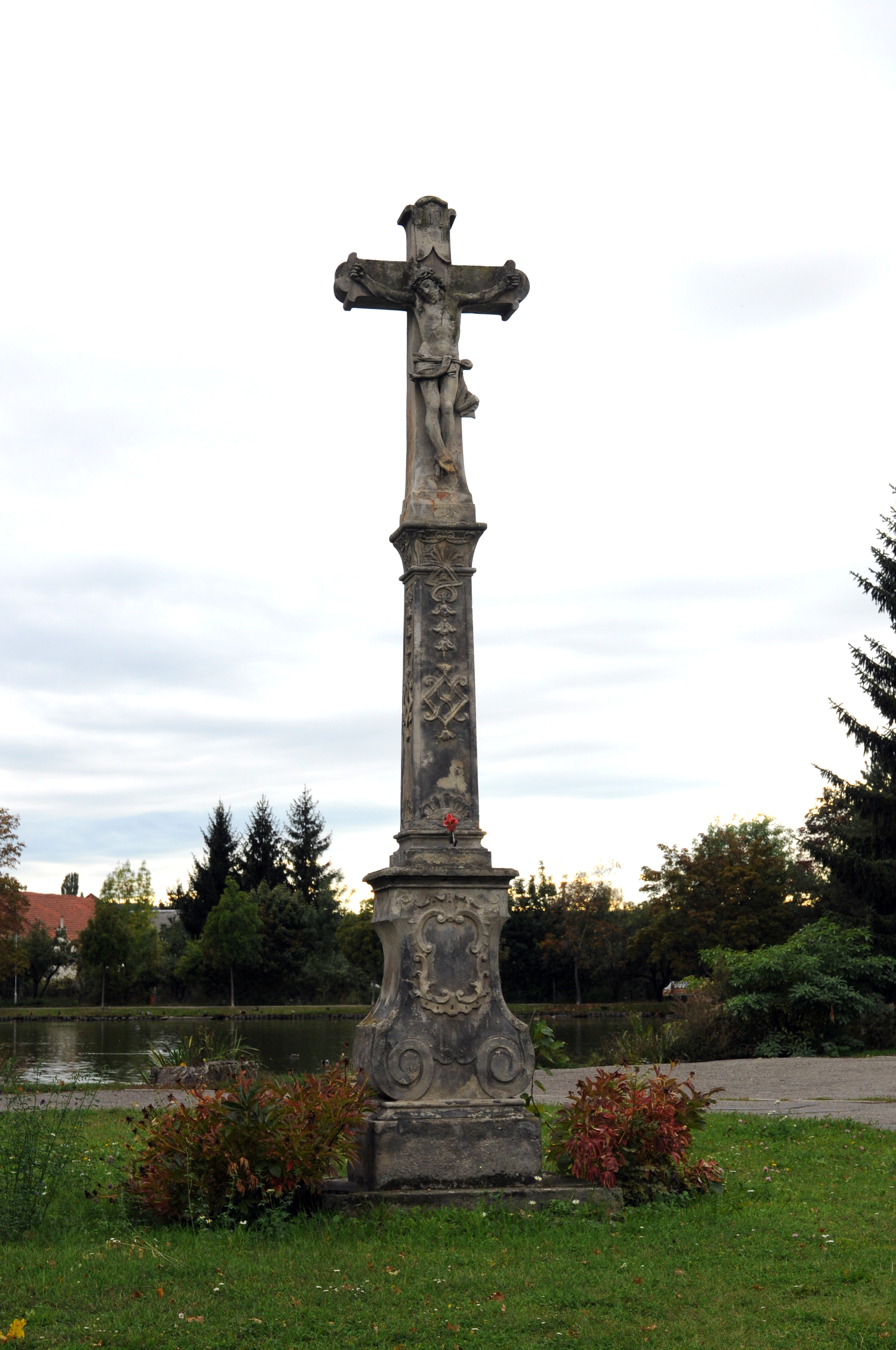 Krucifix (Prostějov), Na Hrázi, Prostějov